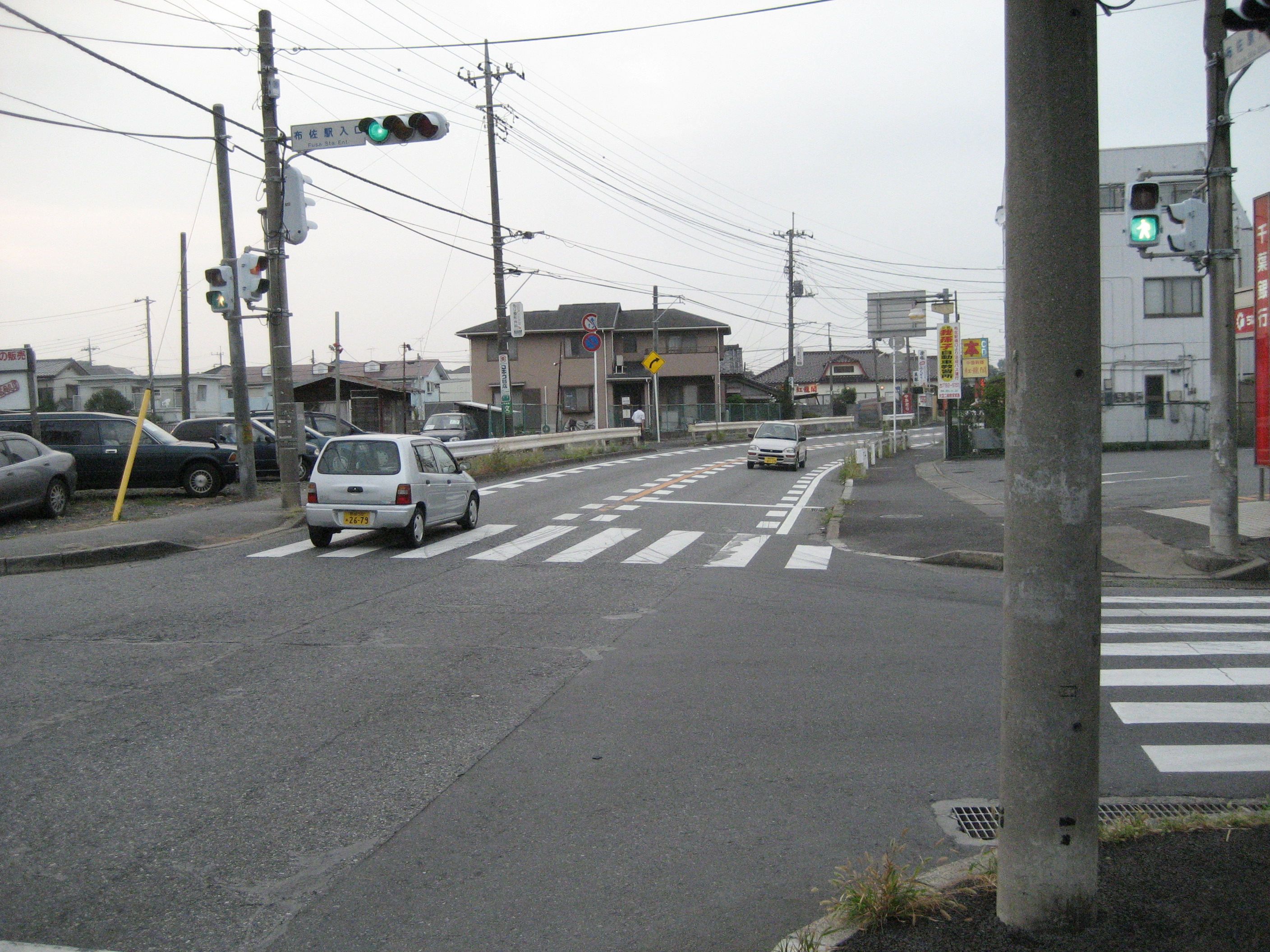 布佐駅入り口交差点